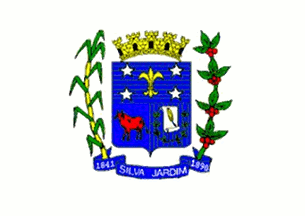 Bandeira do município de Silva Jardim, RJ, Brasil.